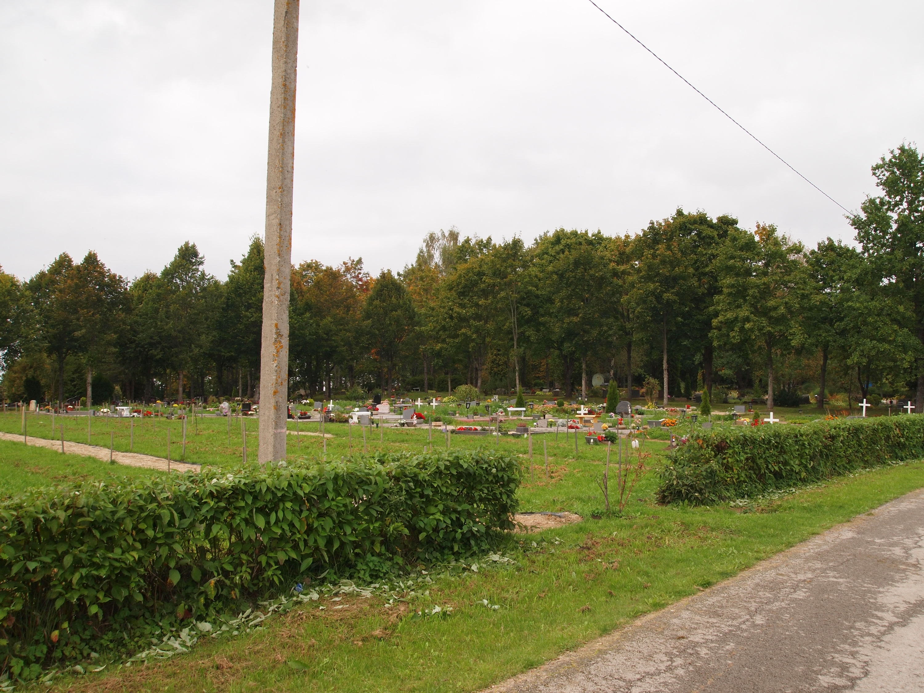 Sillaotsa kalmistu.